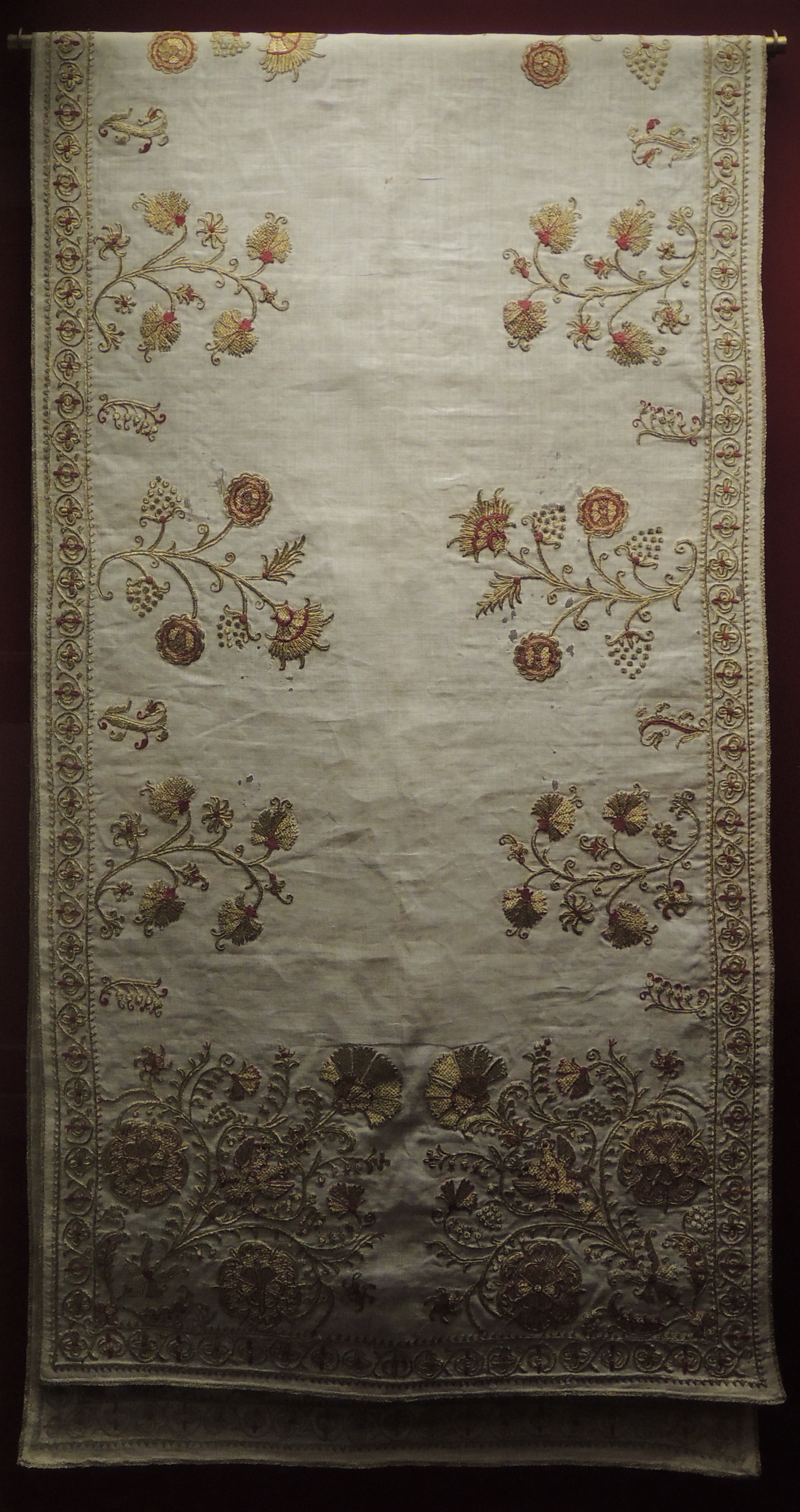 Полотенце. Москва, мастерские Кремля (?), 17 век. Холст, золотные и шелковые нити; шитье. Музеи Московского Кремля. Полотенца использовались в различных церемониях царского двора 17 века. В Чине венчания на царство царя Алексея Михайловича отмечено, что во время церемонии причащения государя обвязывали поперек груди неким полотенцем, именуемым в документе "ручник платен чист". По совершении обряда миропомазания и причащения царь в течении 7 дней не должен был умываться и менять платье, имея возможность лишь "утираться" этим полотенцем. Только на 8-й день государь омывался и одевался в новые одежды